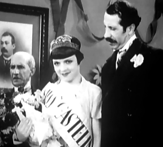 Fotografia Publicitária do Filme A Canção de Lisboa